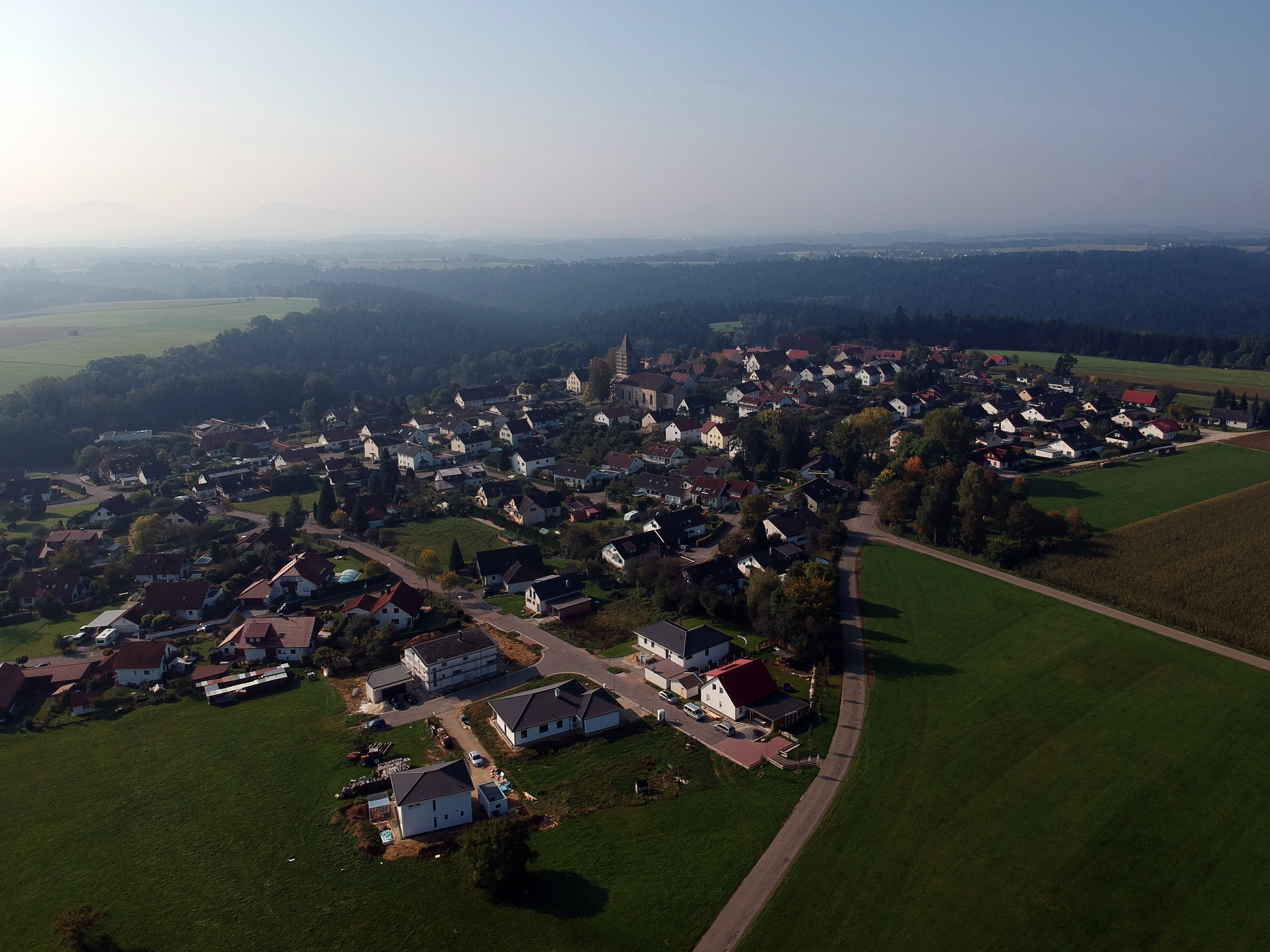 Blick auf Zimmerbach (Ostalbkreis) aus nördlicher Richtung